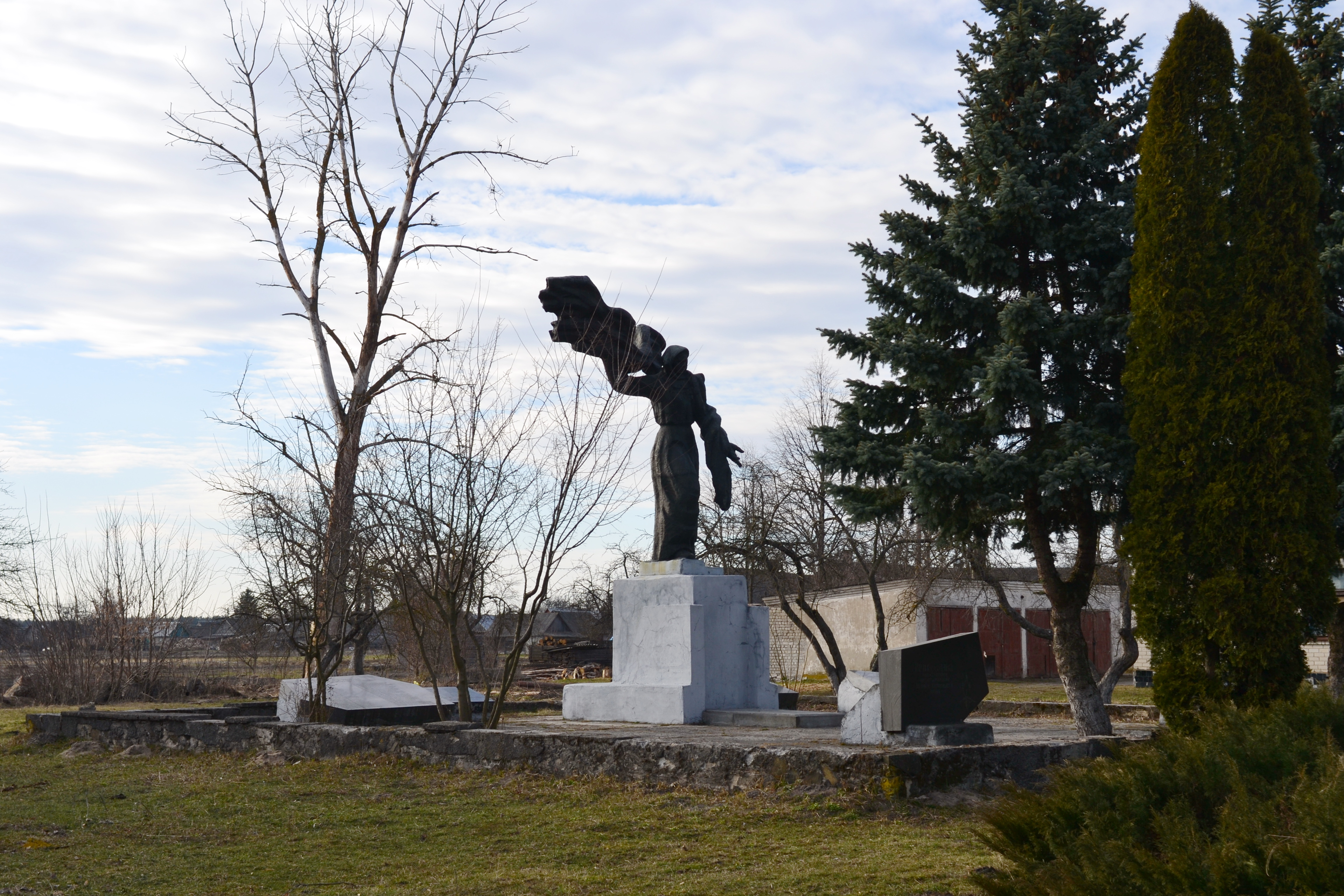 Пам'ятник землякам (1989 рік) - загальний вигляд - Велика Яблунька (південна частина села, біля дороги) Маневицький район Волинська область Україна